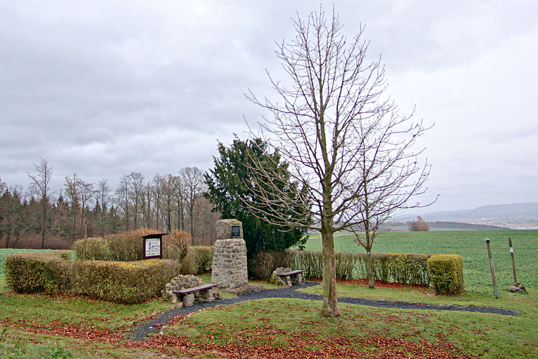 Zepplinstein, Tiefenort